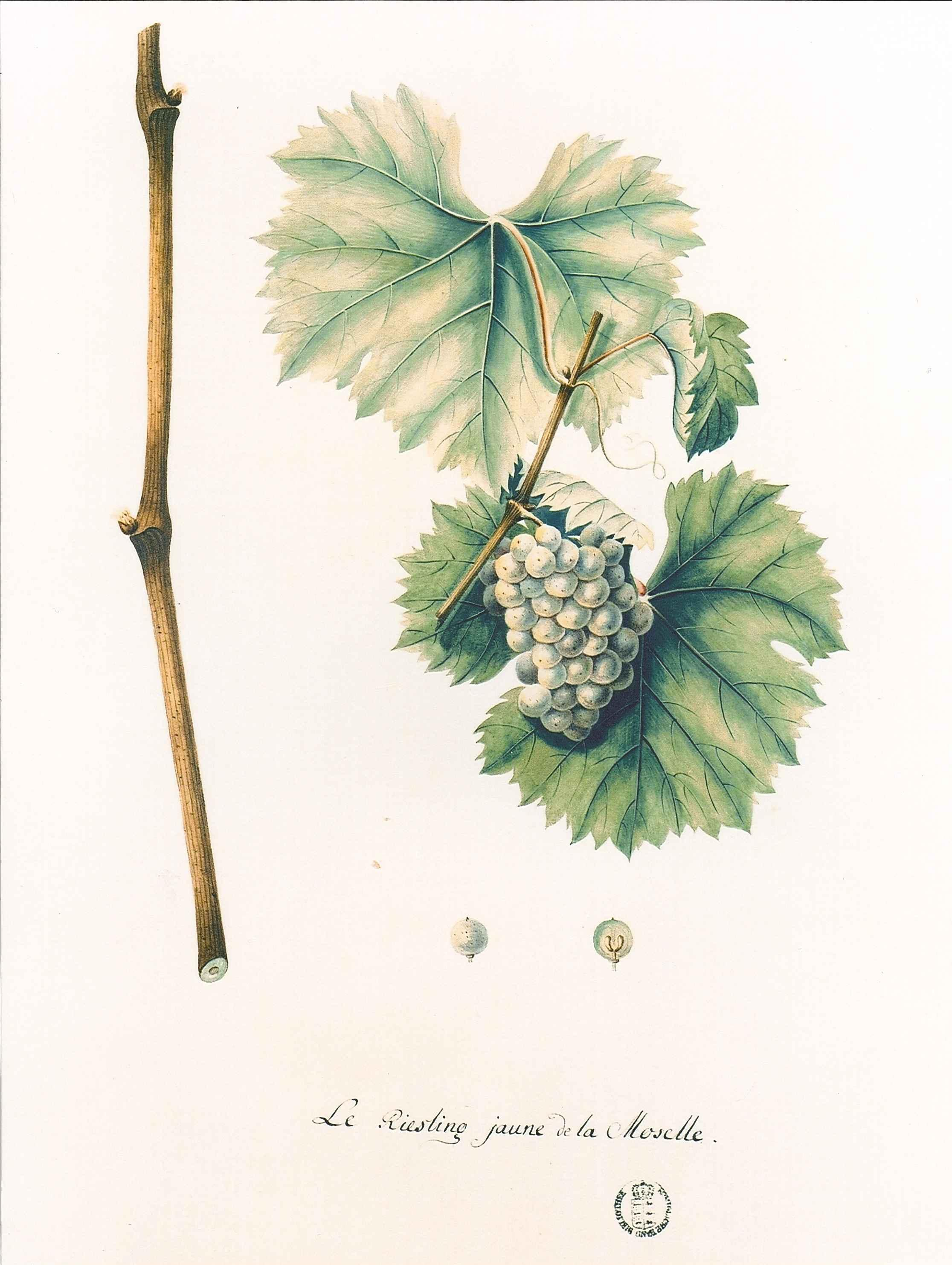 Le Riesling jaune de la Moselle; Illustration d'environ 1830